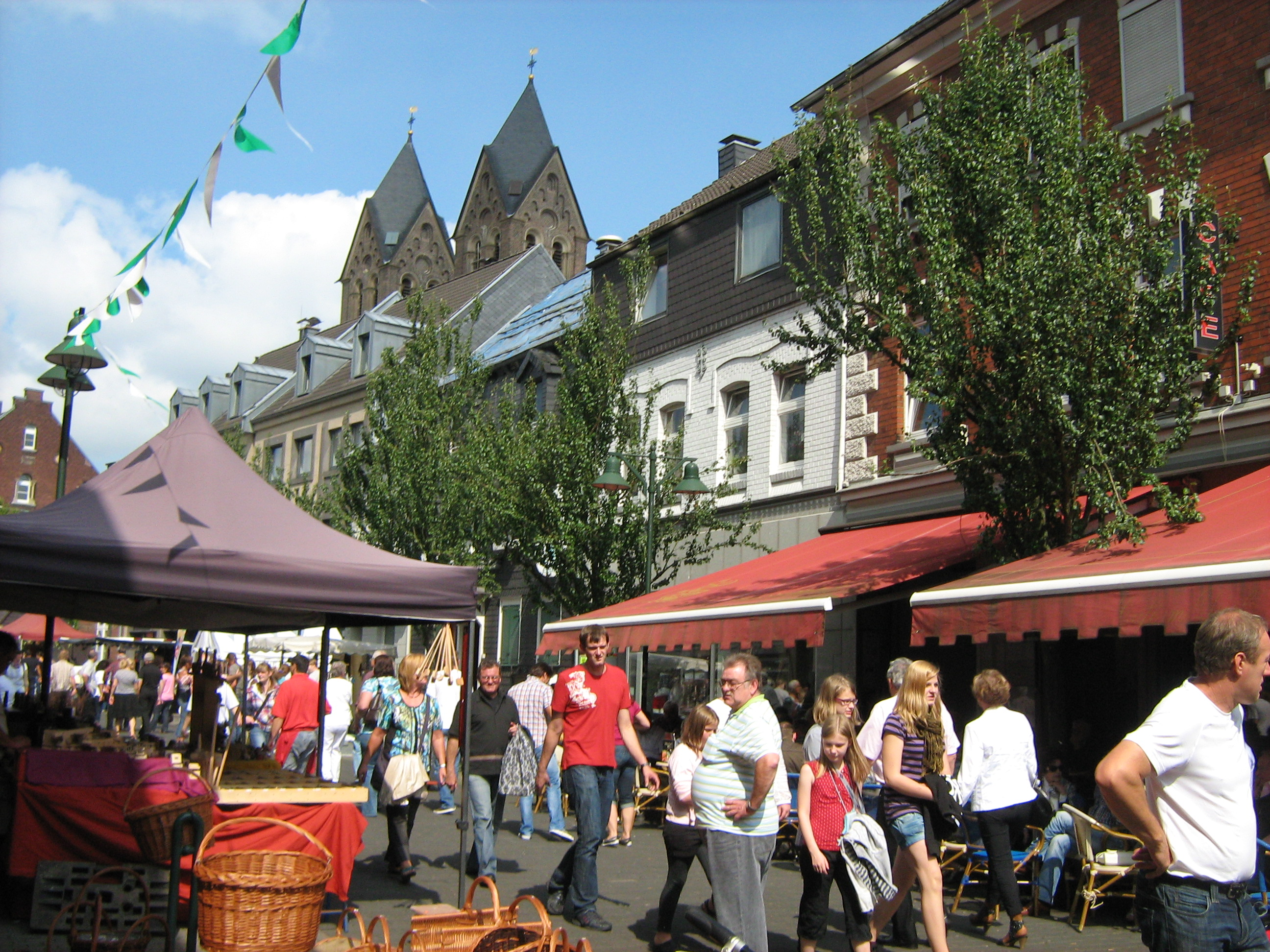 Dies ist die Fußgängerzone in Schlebusch, im Hintergrund ist die Kirche Namens St. Andreas